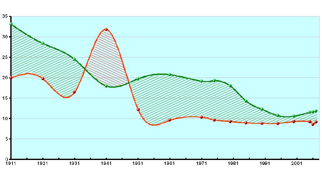 Evolución del crecimiento vegetativo (natalidad - mortalidad) en ‰ en la provincia de Huelva.